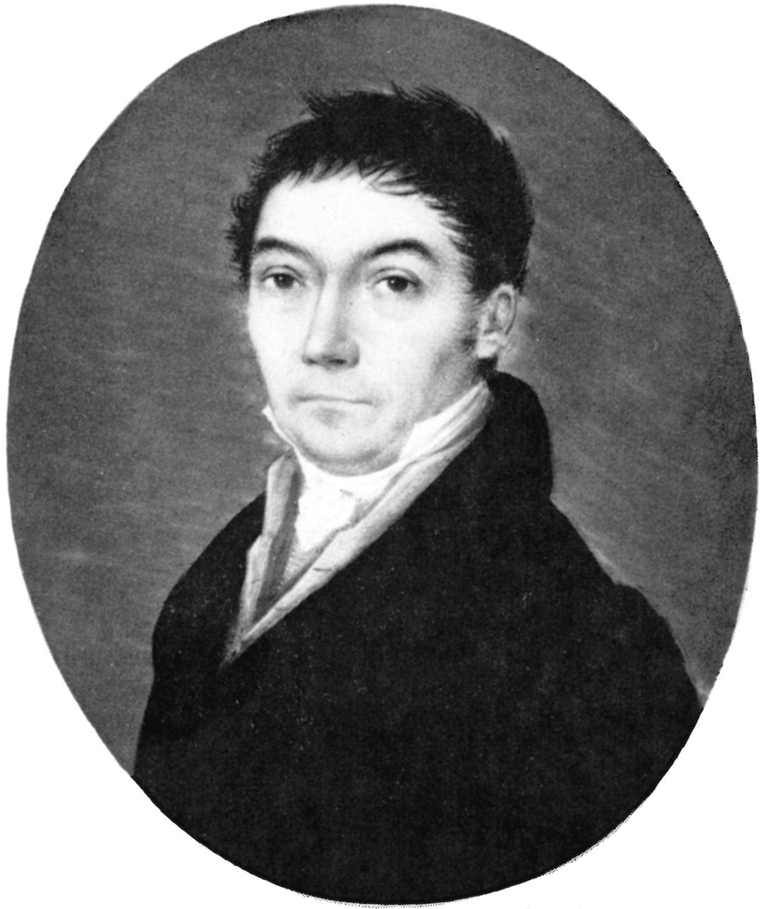 Miniaturbildnis von Christian Landauer (1769-1845), ein Stuttgarter Freund von Friedrich Hölderlin.